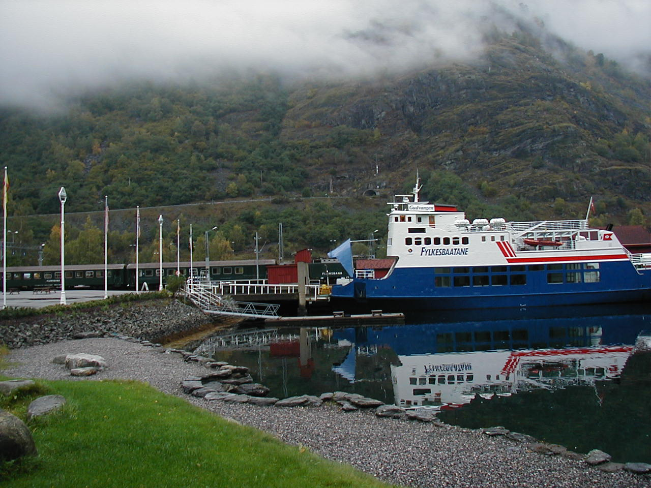 Flåm